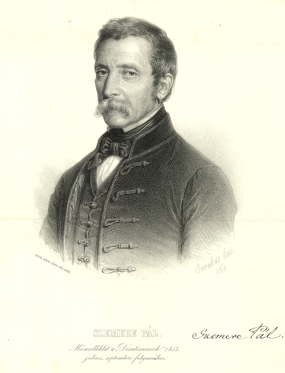 Szemere Pál (Pécel, 1785. február 19. – Pécel, 1861. március 14.) a Magyar Tudományos Akadémia és a Kisfaludy Társaság tagja, költő, író.